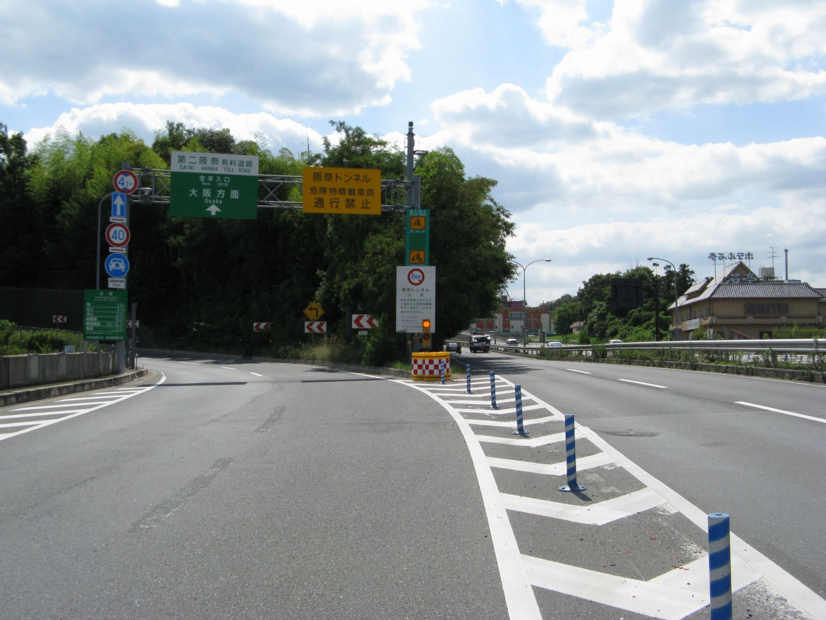 第二阪奈有料道路 宝来ランプ 大阪方面入口を西望 右はja:奈良県道1号奈良生駒線